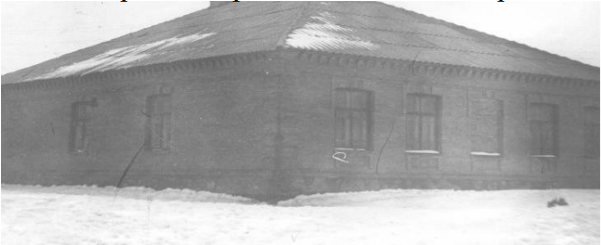 Земуправа с. Олександропіль